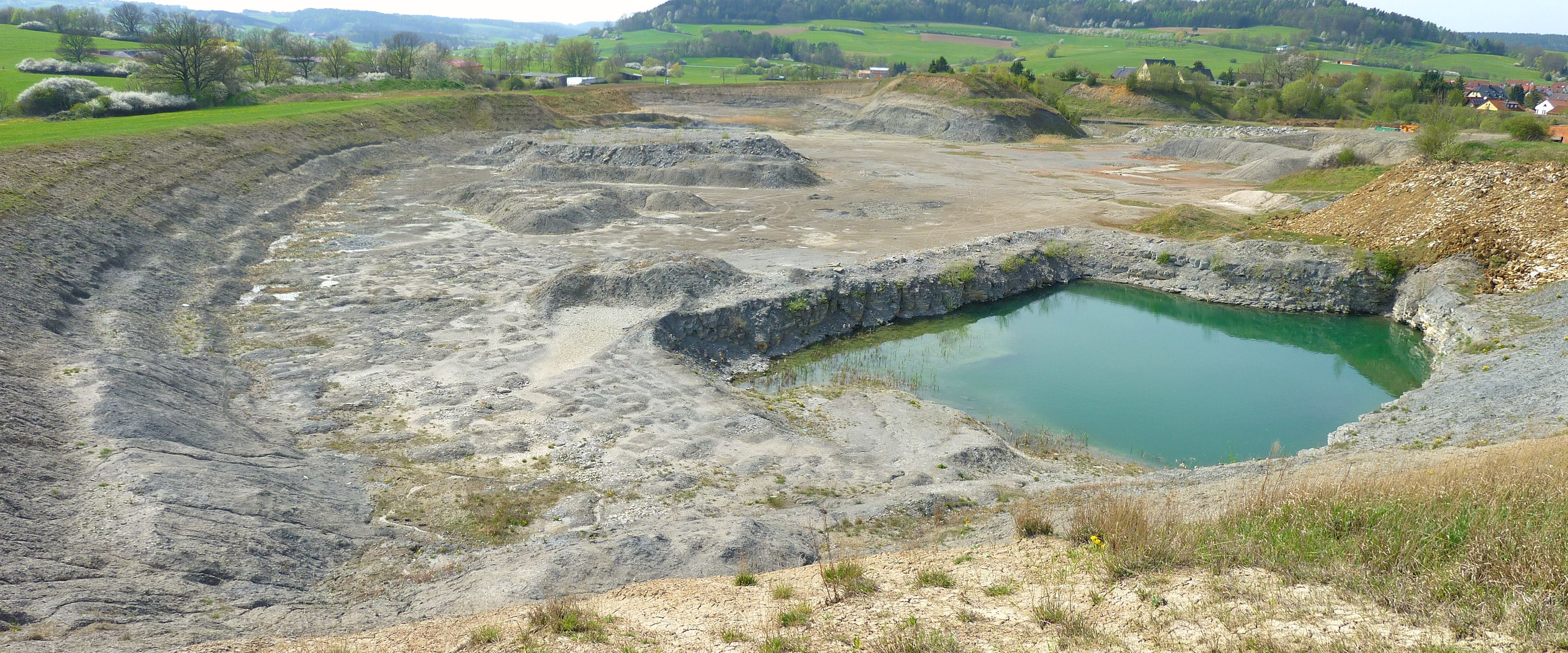 Mistelgau, Fossiliengrube (ehem. Tongrube), Geotop-Nr.94 (Bayern)